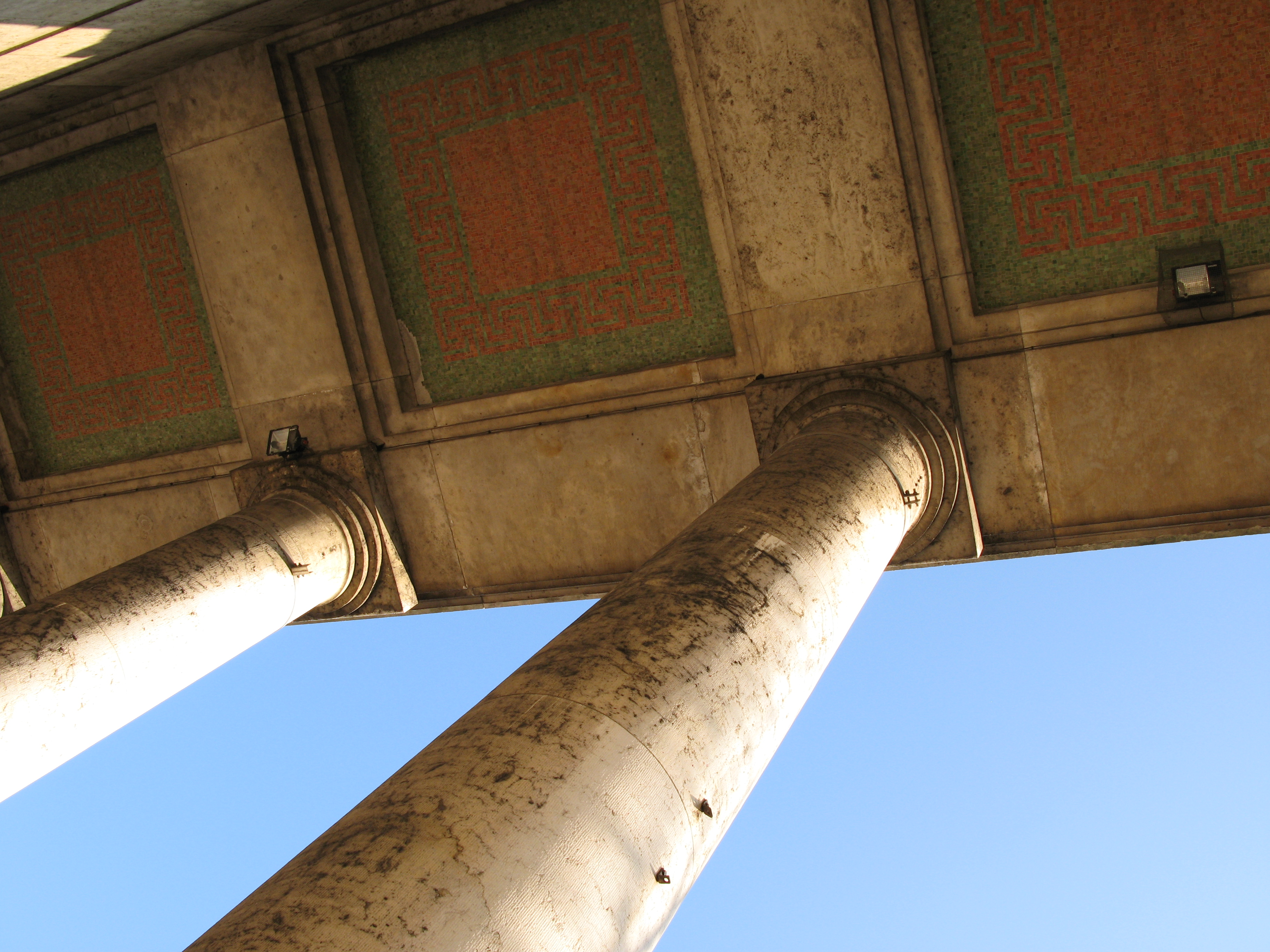 Haus der Kunst, München. Blick unter den Portikus